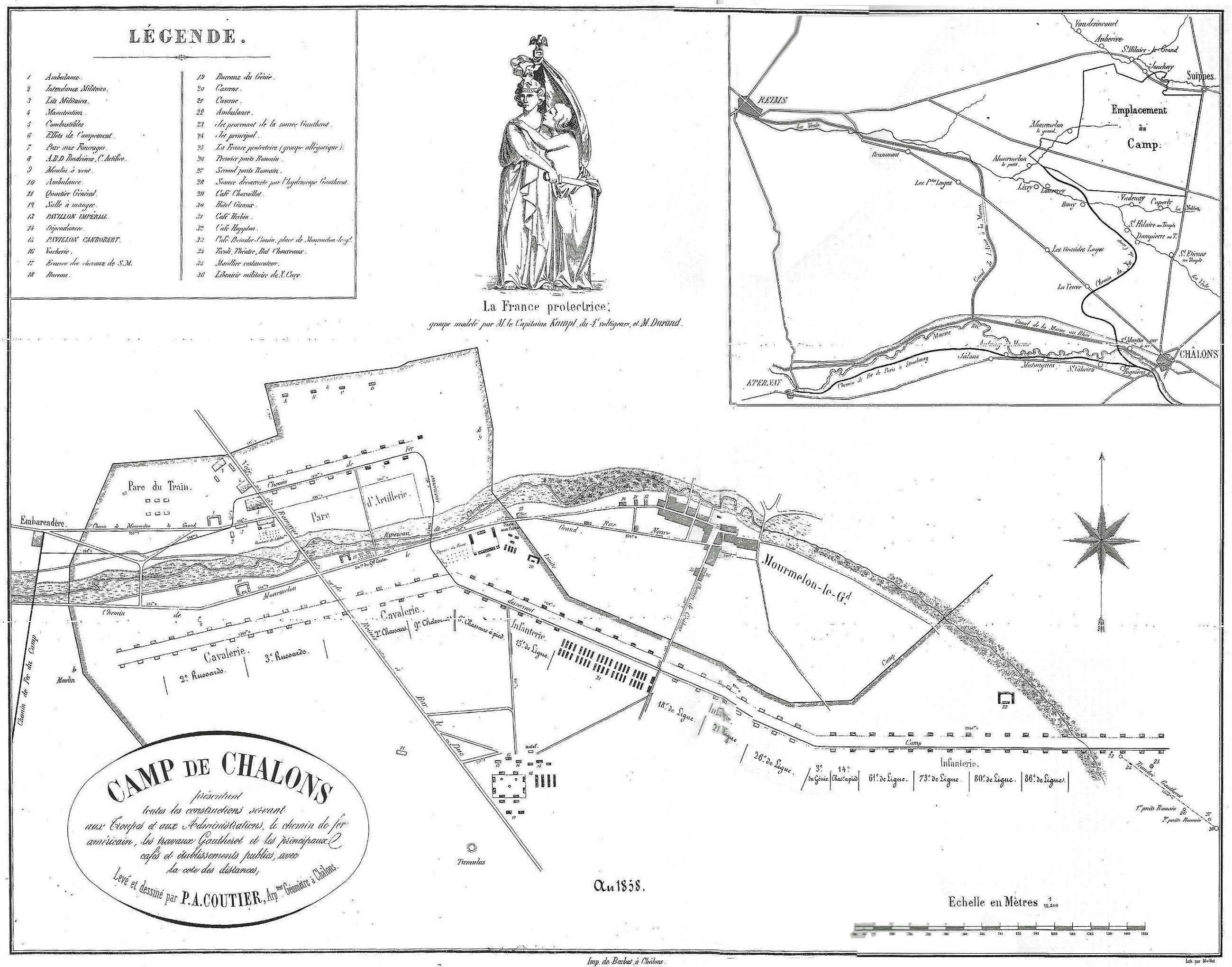 Camp de Châlons plan des origines.jpg